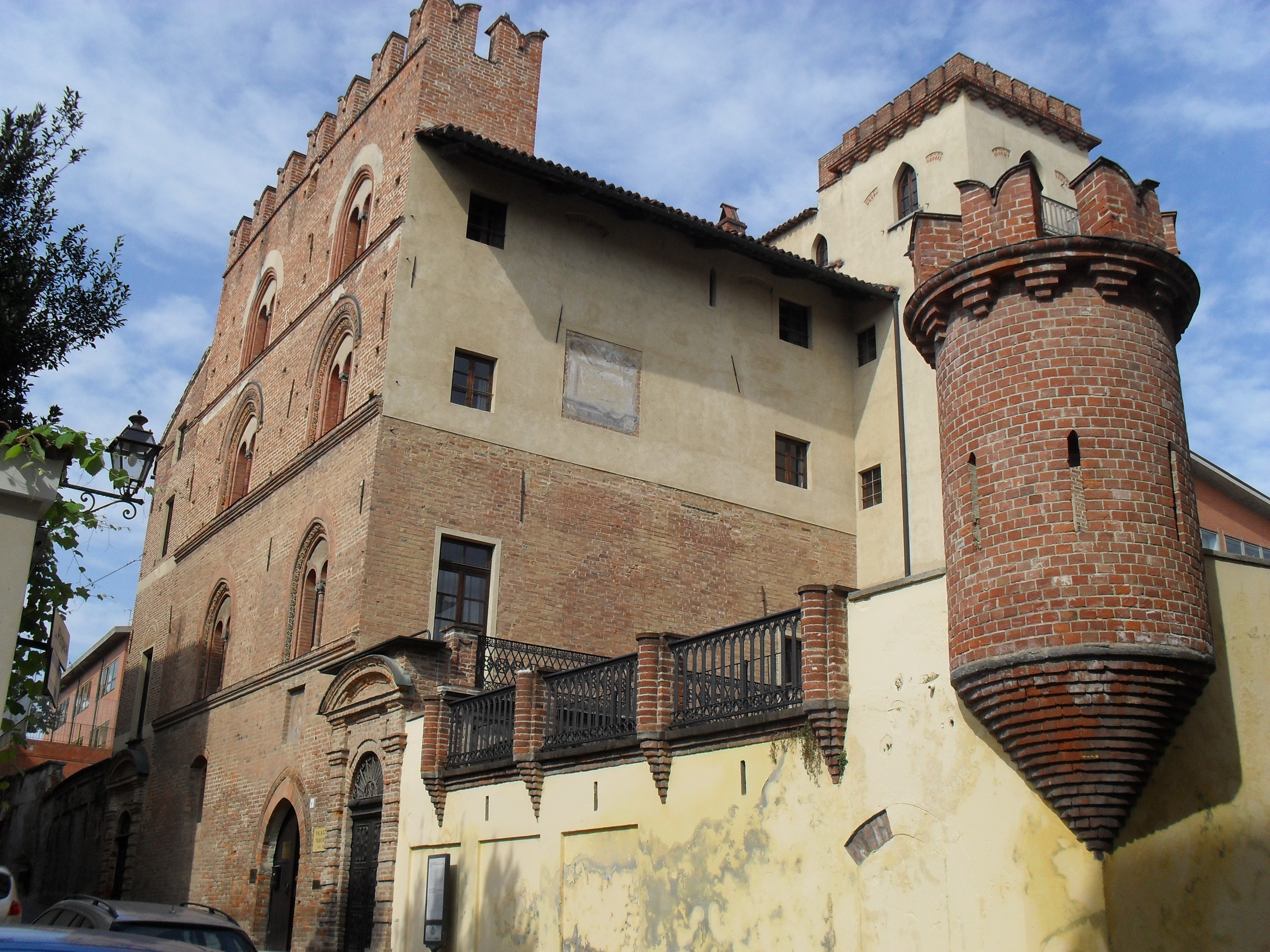 Palazzo Traversa This is a photo of a monument which is part of cultural heritage of Italy.